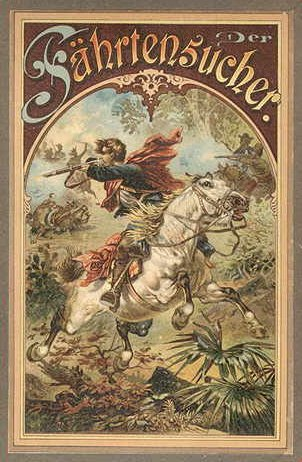 Der Fährtensucher (Originaltitel: Le Chercheur de pistes). Eine Erzählung aus dem Leben der wilden Völkerschaften des westlichen Amerika. Nach G. Aimard’s gleichnamiger Schilderung für die Jugend bearbeitet von O. Höcker. Mit Farbdruckbildern. Stereotyp-Ausgabe. Reutlingen, Druck und Verlag von Enßlin und Laiblin.